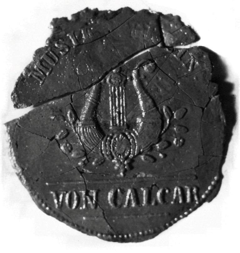 Das rote Wachssiegel mit dem Emblem des Vereins stammt von einem Brief aus dem Jahre 1833.